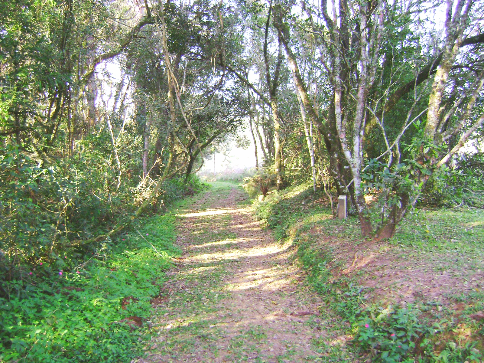 Trilha do Parque Ecológico Samuel Klabin, na fazenda Monte Alegre, em Telêmaco Borba, no Paraná.